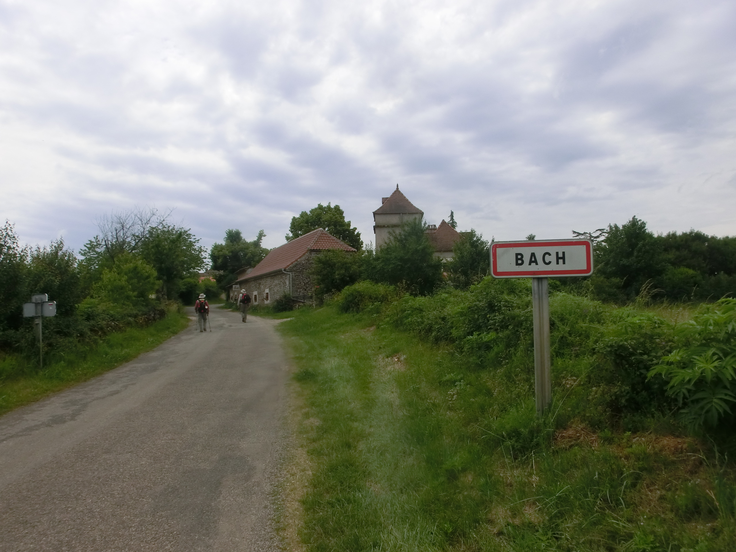 L'entrée du village